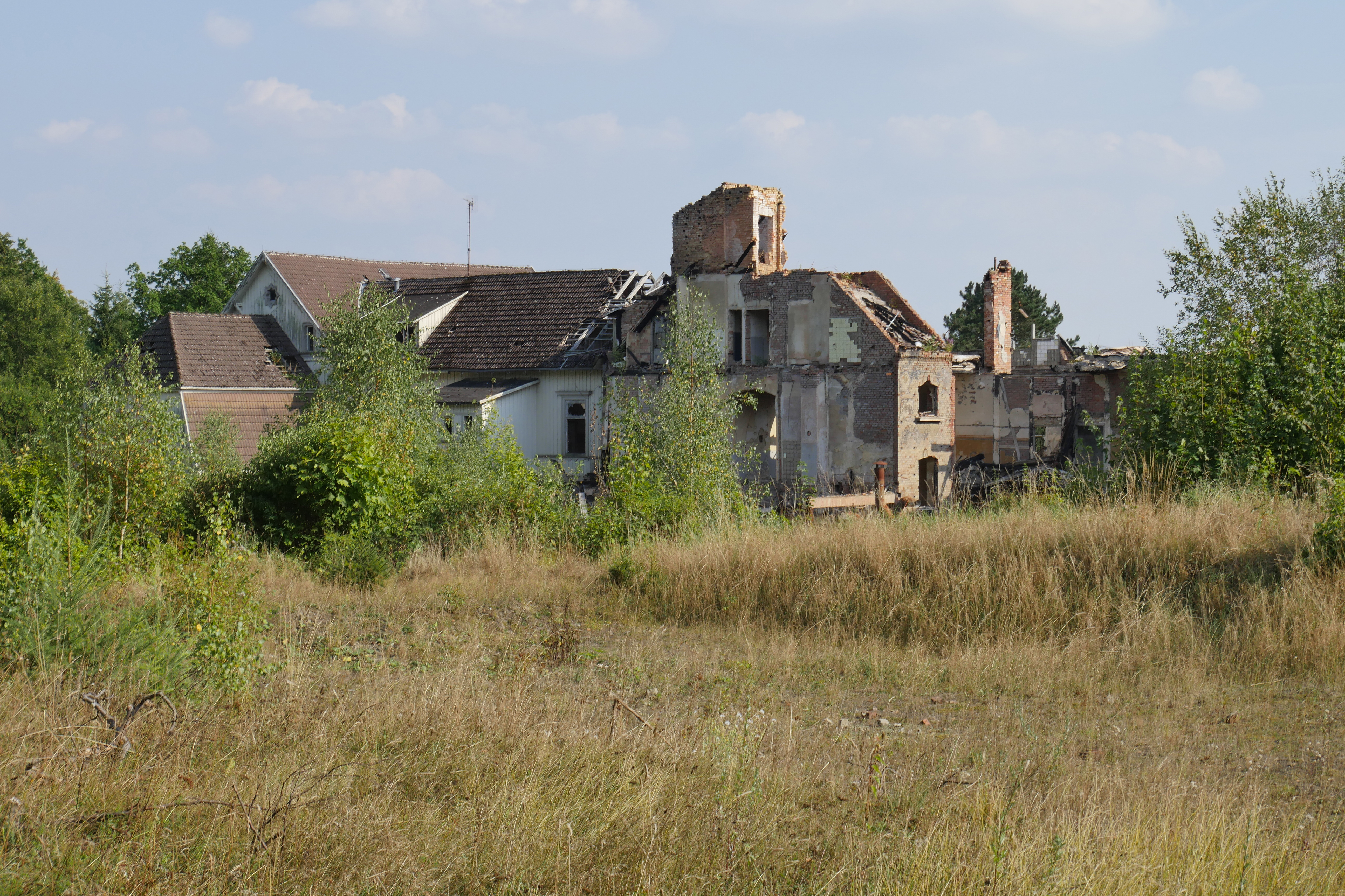 Seit 2013 verfällt das Albrechtshaus nach einem Brand mehr und mehr.